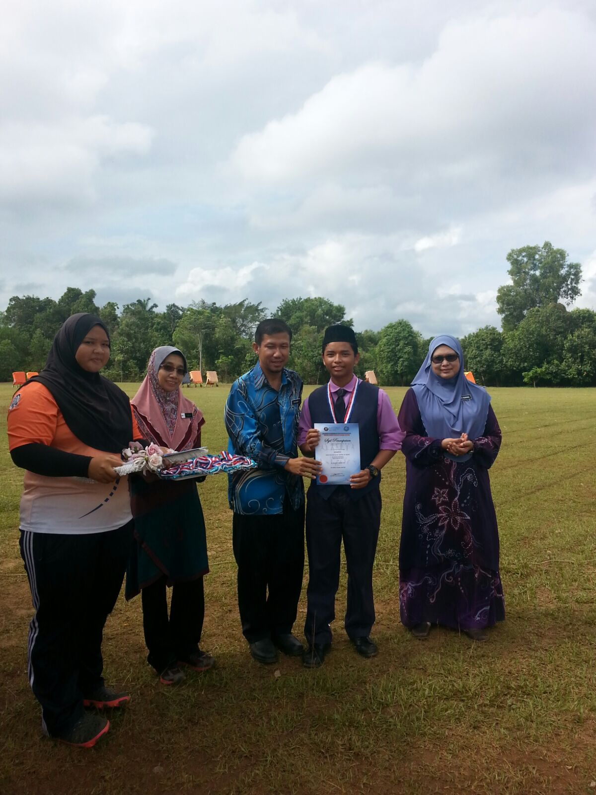 Hasil kebitaraan Memanah